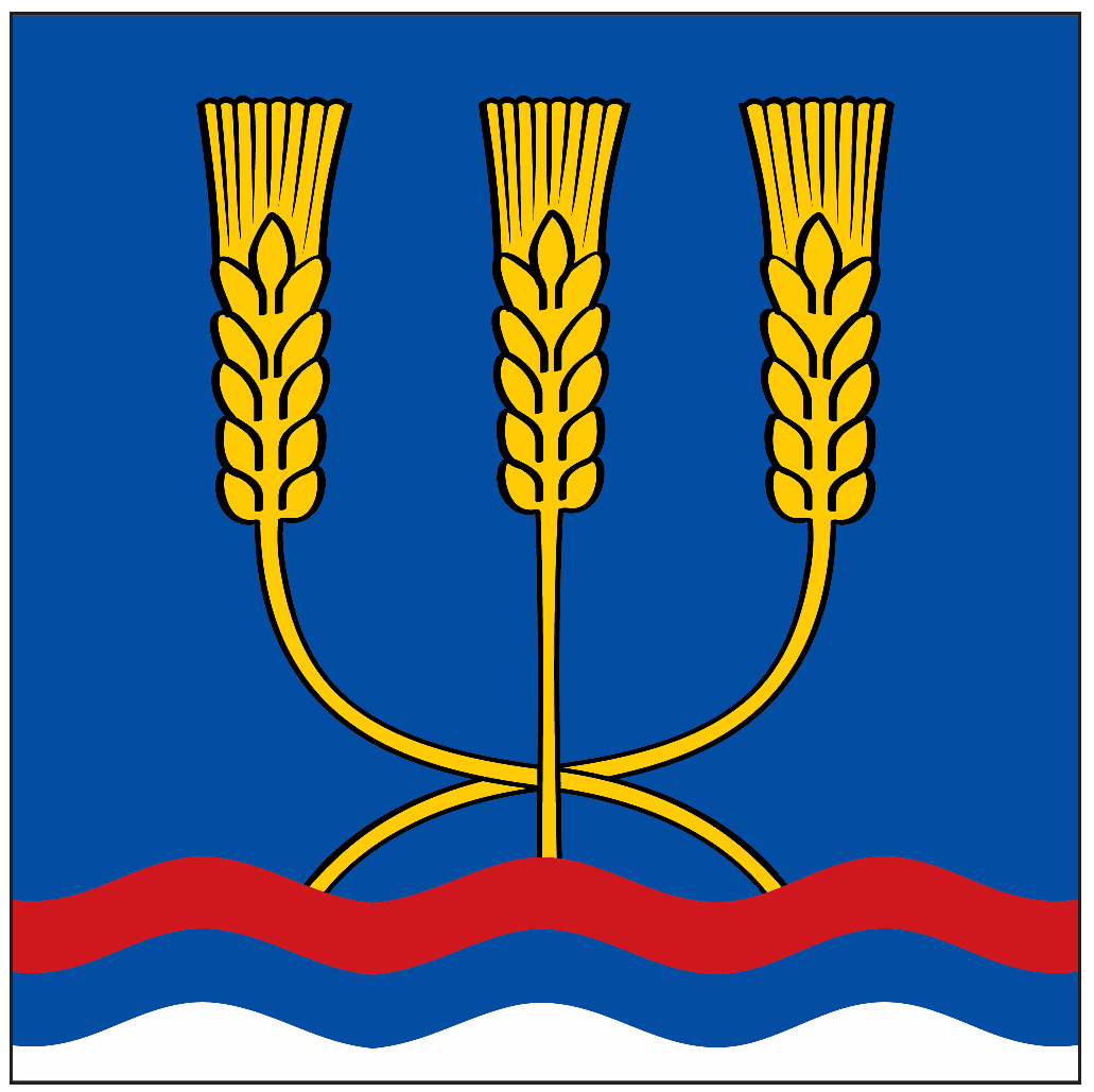 Застава општине Житорађа је квадратног облика са односом страница 1:1. На њој су, на плавој основи, представљени хералдички елементи: три кривудаве линије у црвеној, плавој и белој боји (боје заставе Р. Србије), којима је представљена река Топлица и три класа пшенице или жита, који симболизују пољопривреду наше општине као основну делатност становништва и који алудирају на име општине. Графичко решење знамења Општине Житорађа урадио је Љубиша Стевановић из Житорађе, радник Општинске управе општине Житорађа, уз стручну помоћ Ивана Сарајчића. Застава је званично усвојена на седници Скупштине општине Житорађа, дана 15.10.2010. године. Употреба је регулисана Одлуком о употреби имена, грба и заставе општине Житорађа.